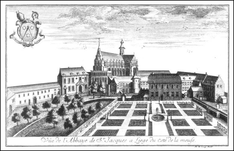 Gezicht op de voormalige abdij van Saint-Jacques-le-Mineur te Luik rond 1735, getekend door Remacle Le Loup. Deze gravure komt uit Les Delices du Païs de Liege (deel I, p. 163), gedrukt in Luik in 1738 door Kints, onder leiding van Pierre-Lambert de Saumery.